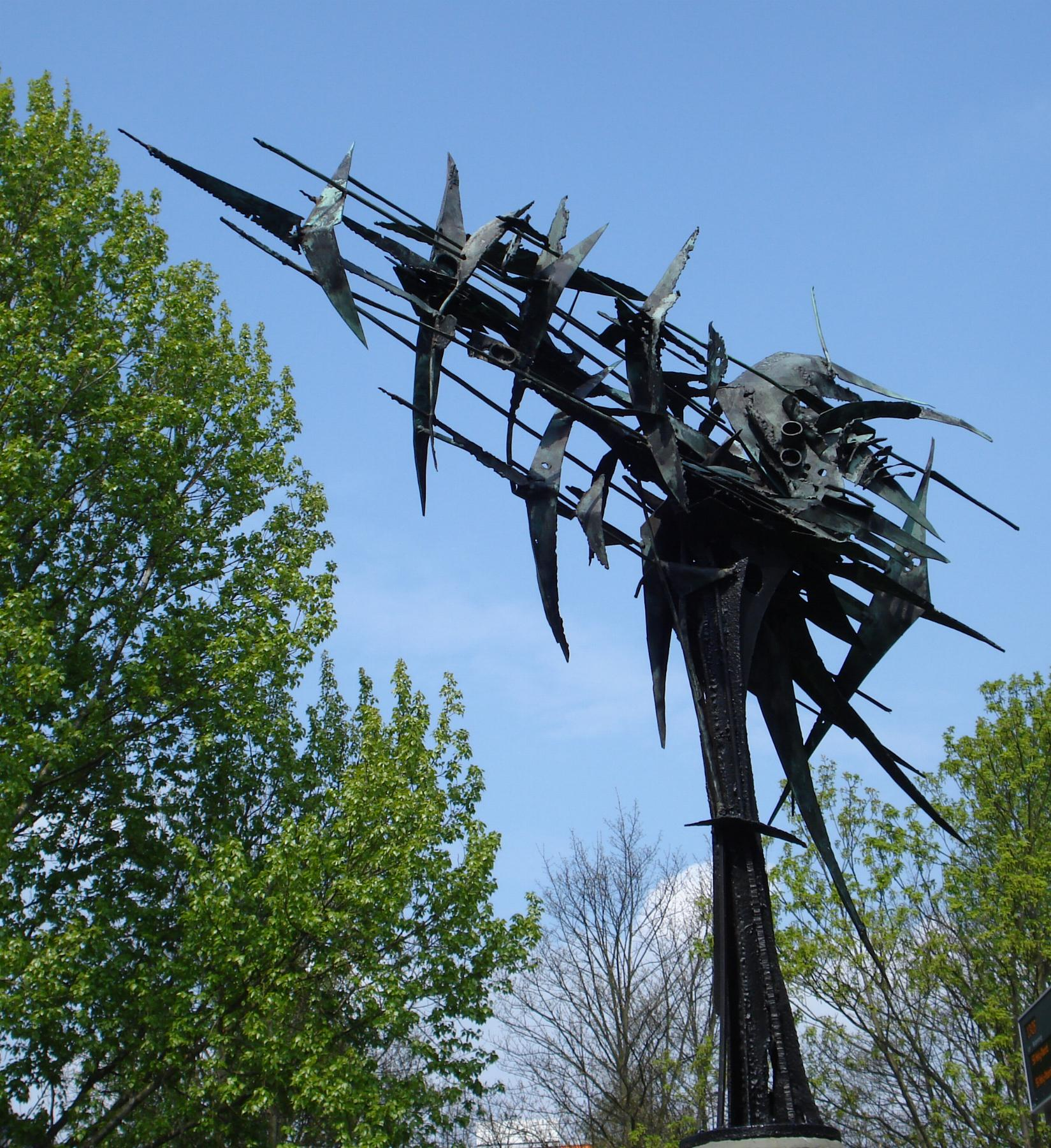 Vlaardingen, Frederik Hendriklaan. Kunstwerk "Vogelvlucht" van Jan de Winter. Vlaardingen/The Netherlands.